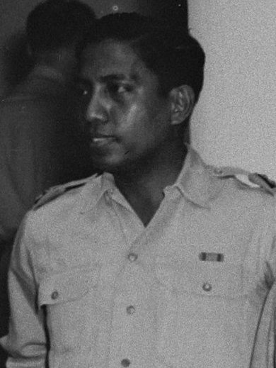 Collectie / Archief : Fotocollectie Anefo Reportage / Serie : [ onbekend ] Beschrijving : Het Constructiekabinet van Oost-Indonesië dat om 4 uur in de middag in het voormalig gebouw van de Raad van Indië te Batavia werd geïnstalleerd. Vlnr: kapitein J. Tahija, minister van Sociale Zaken; mr. Tjia Kok Tjiang, minister van Justitie; E.D. Dengah, minister van Verkeer en Waterstaat; Nadjaroeddin Daeng Malewa, minister-president en minister van Economische Zaken; Anak Agoeng Gde Agoeng, minister van Binnenlandse Zaken; Dr. S.J. Warouw, minister van Gezondheid; G.R. Pantouw, minister van Voorlichting Annotatie : Repronegatief Datum : 13 januari 1947 Locatie : Batavia, Indonesië, Jakarta, Nederlands-Indië Trefwoorden : groepsportretten, kabinetten, staten Persoonsnaam : Anak Agoeng Gde Agoeng, Dengah, E.D., Nadjaroeddin Daeng Malewa, Pantouw, G.R., Tahija, J, Tjia Kok Tjiang, Warouw, S.J. Fotograaf : NIGIS [Netherlands Indies Government Information Service] Auteursrechthebbende : Nationaal Archief Materiaalsoort : Glasnegatief Nummer archiefinventaris : bekijk toegang 2.24.01.09 Bestanddeelnummer : 902-0057